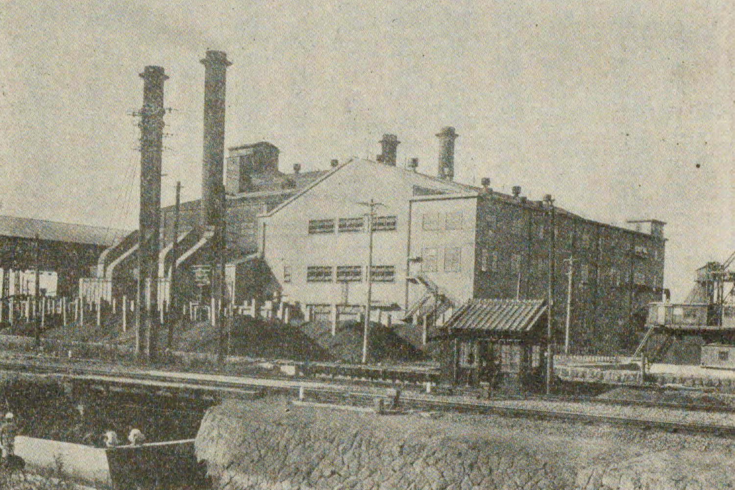 九州電気軌道が建設した小倉火力発電所（1931 - 1963年）